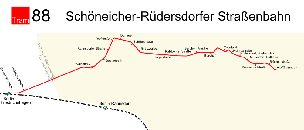 Verlauf der Tram 88 in Berlin/Schöneiche-Rüdersdorf